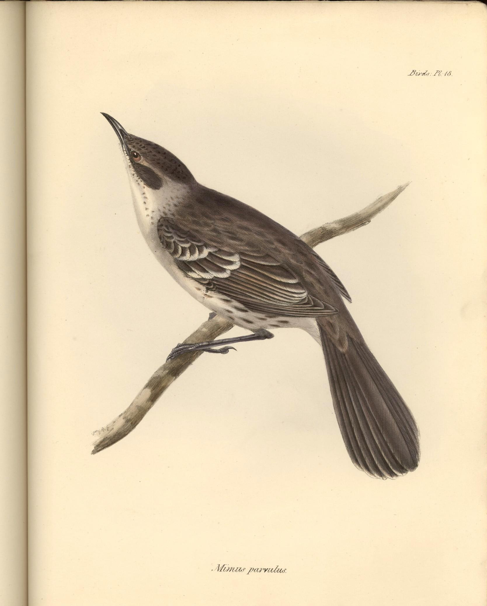 Mimus parvulus now named Nesomimus parvulus - Galápagos Mockingbird